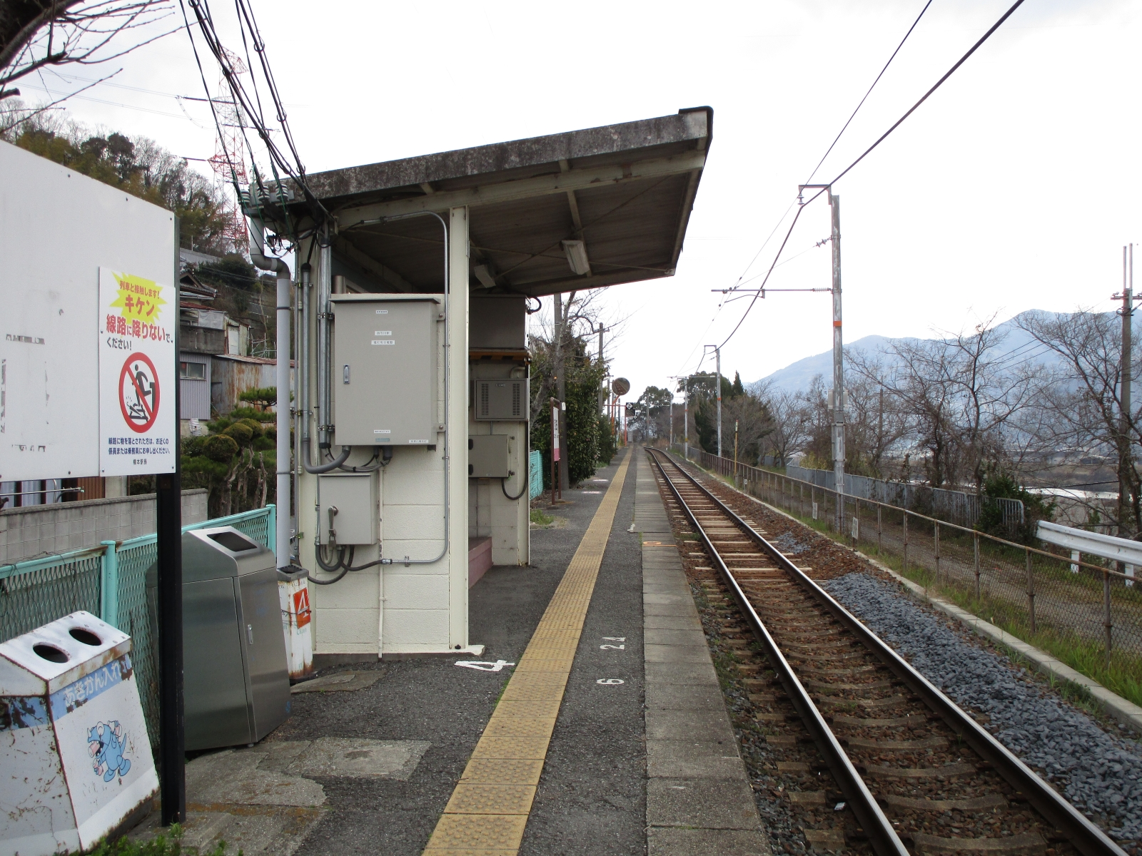 西笠田駅のホーム